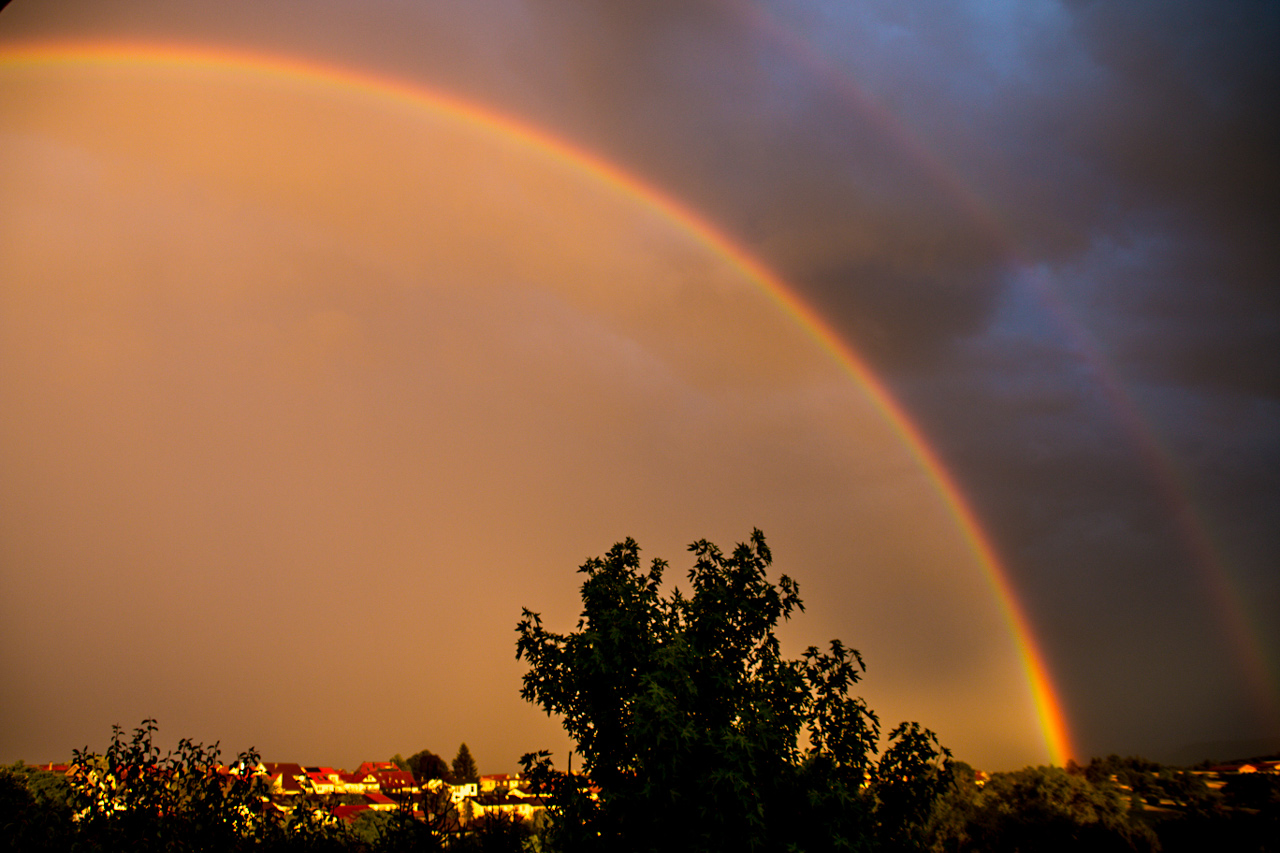 Imposanter Regenbogen bei Sonnenuntergang